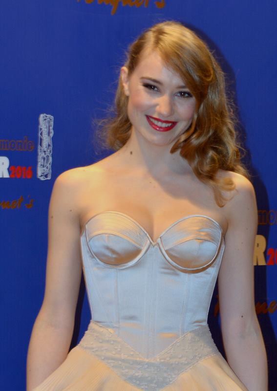 Deborah François à la cérémonie des César